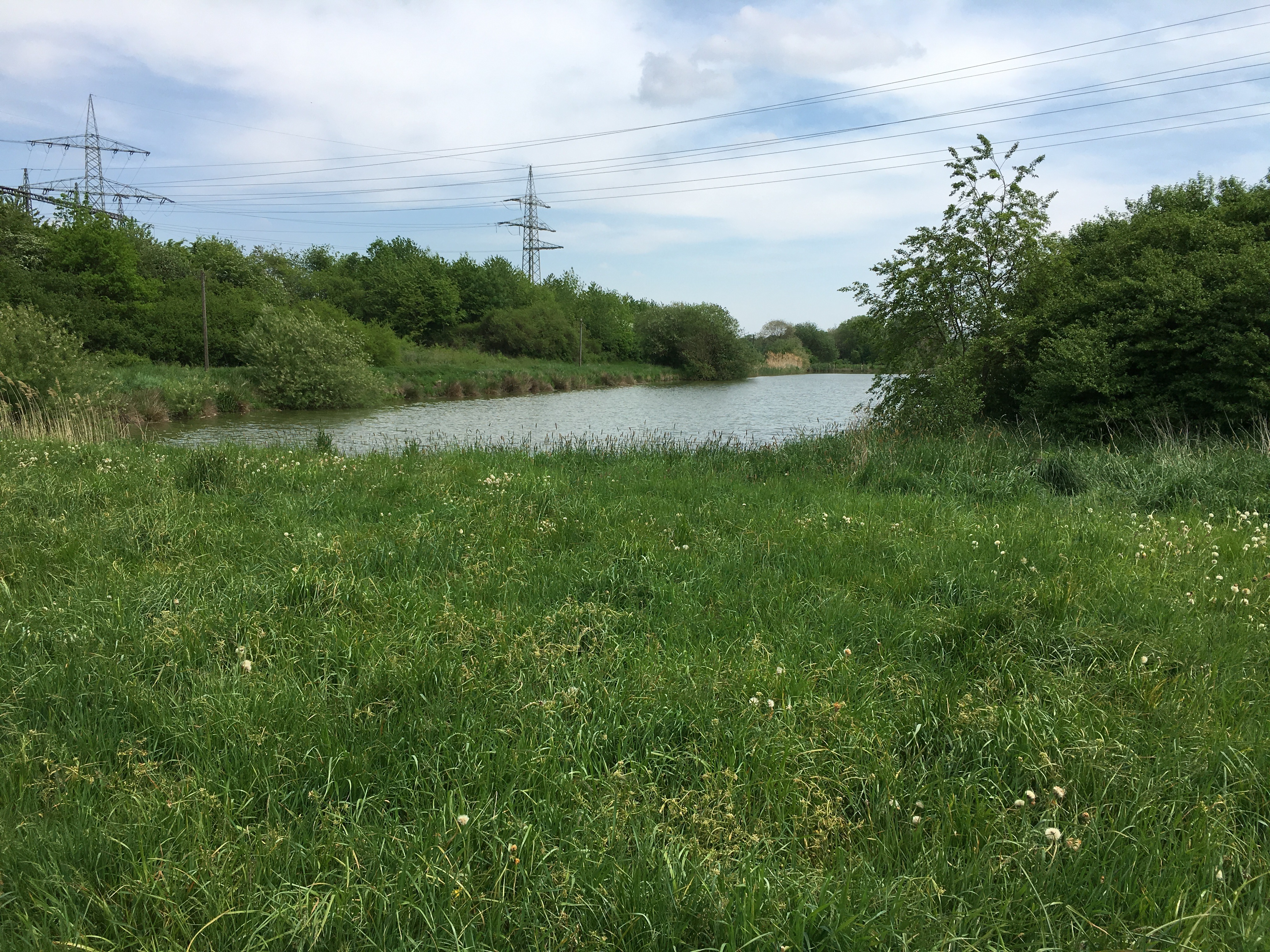 (LSG:BY-LSG-00340.12)_Rittersbachtal